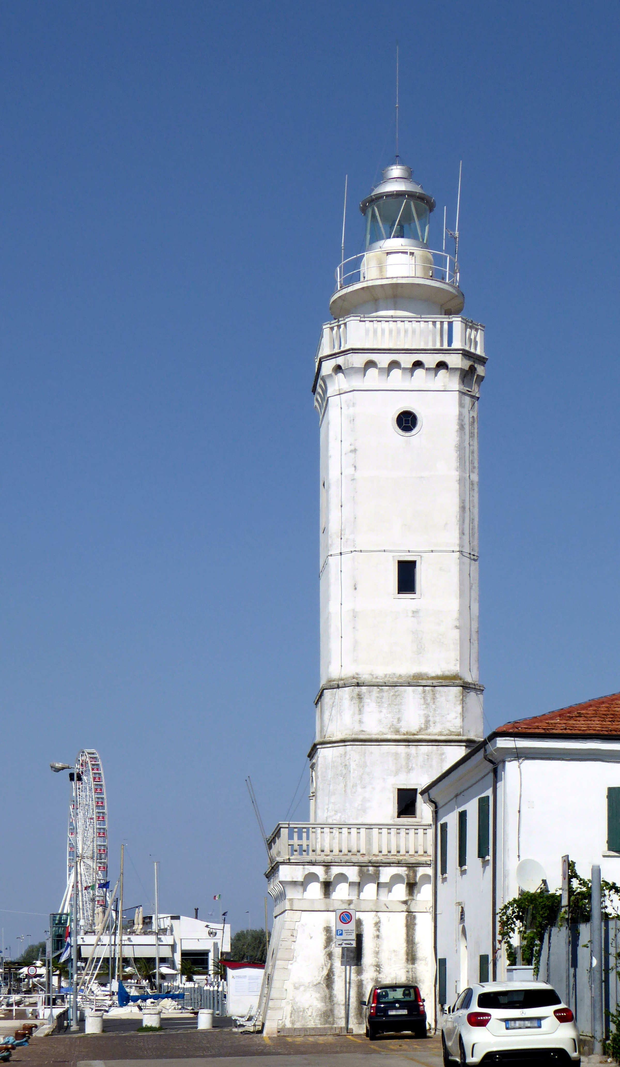 Der Leuchtturm am Hafen von Rimini. Links im Hintergrund das Riesenrad.